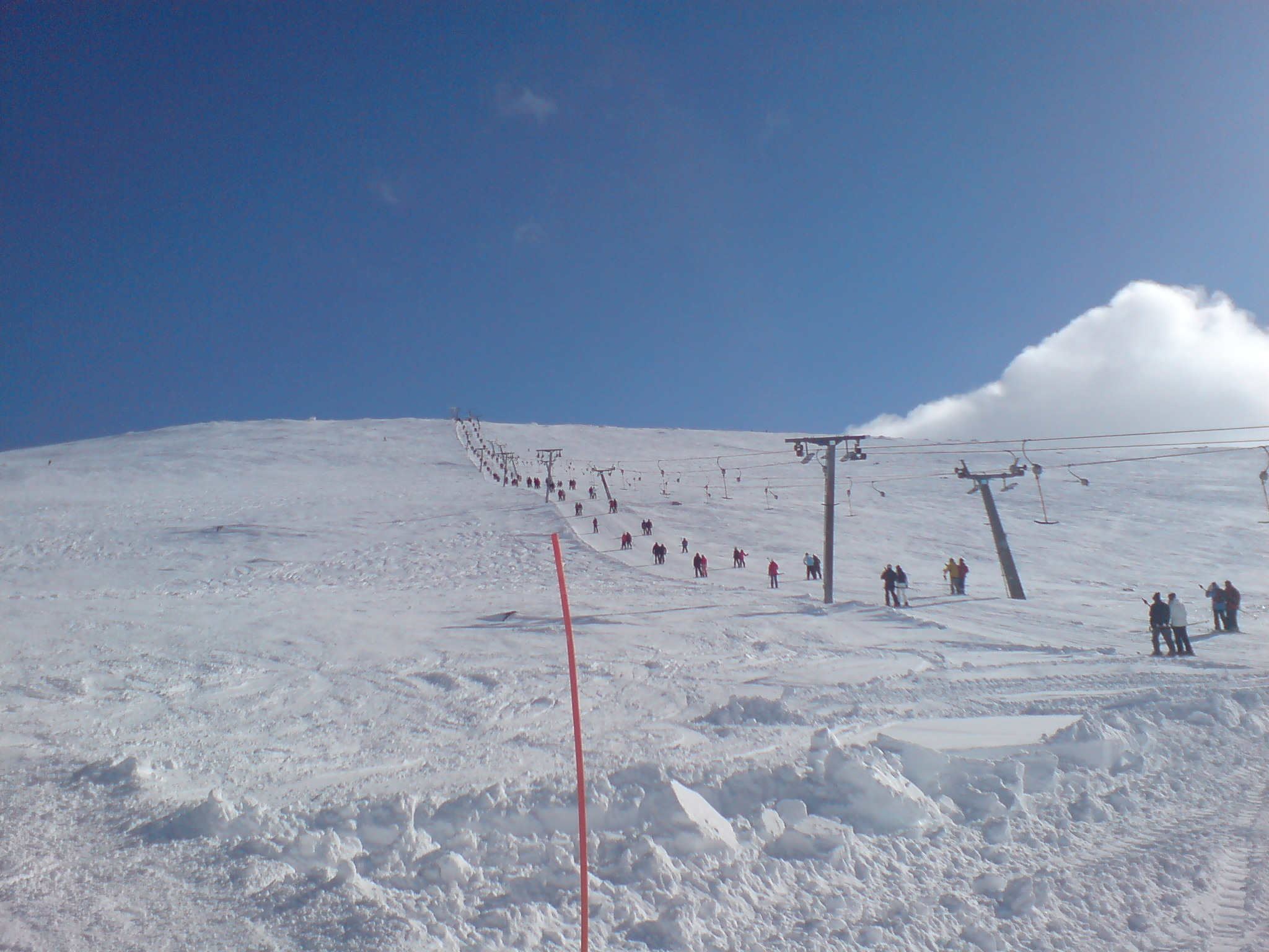 Tväråvalvsliftarna i Åre